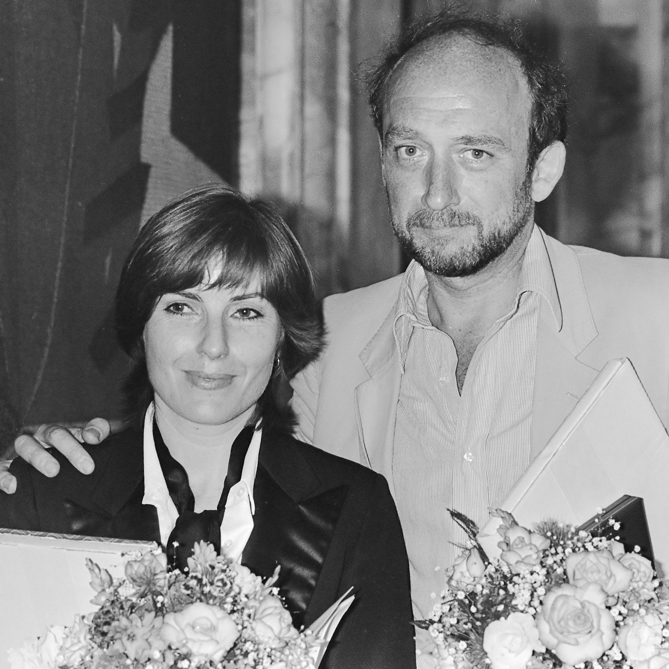 Toneelprijzen 1980 uitgereikt door minister Gardeniers (CRM) in Leiden; winnaars Jose Ruiter (links) en Hans Croiset 20 mei 1980